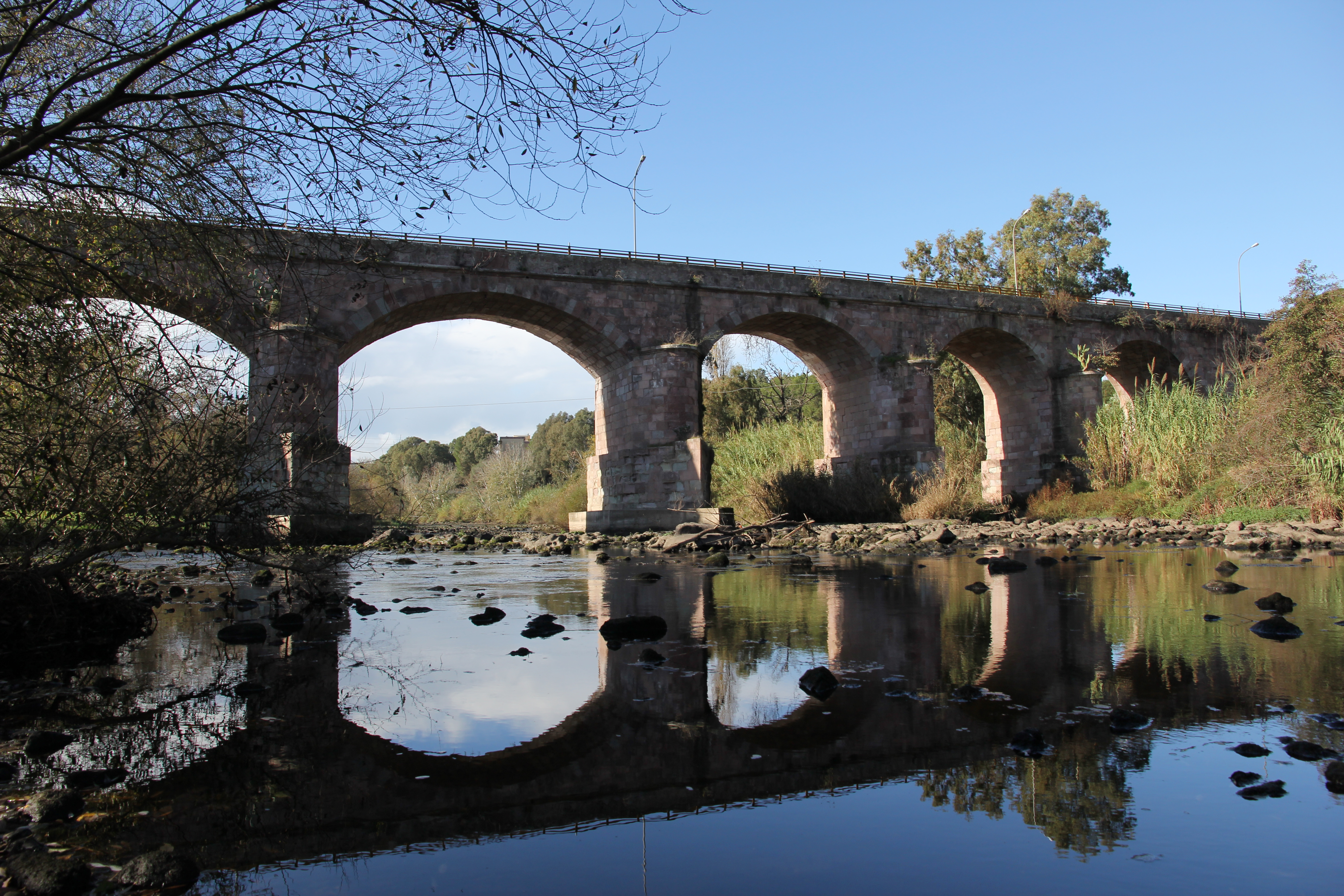 Fordongianus - Ponte sul Tirso-SS 388